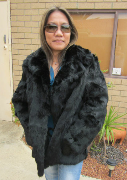 Skunkskaninjacke, Alter der Jacke nicht bekannt.)